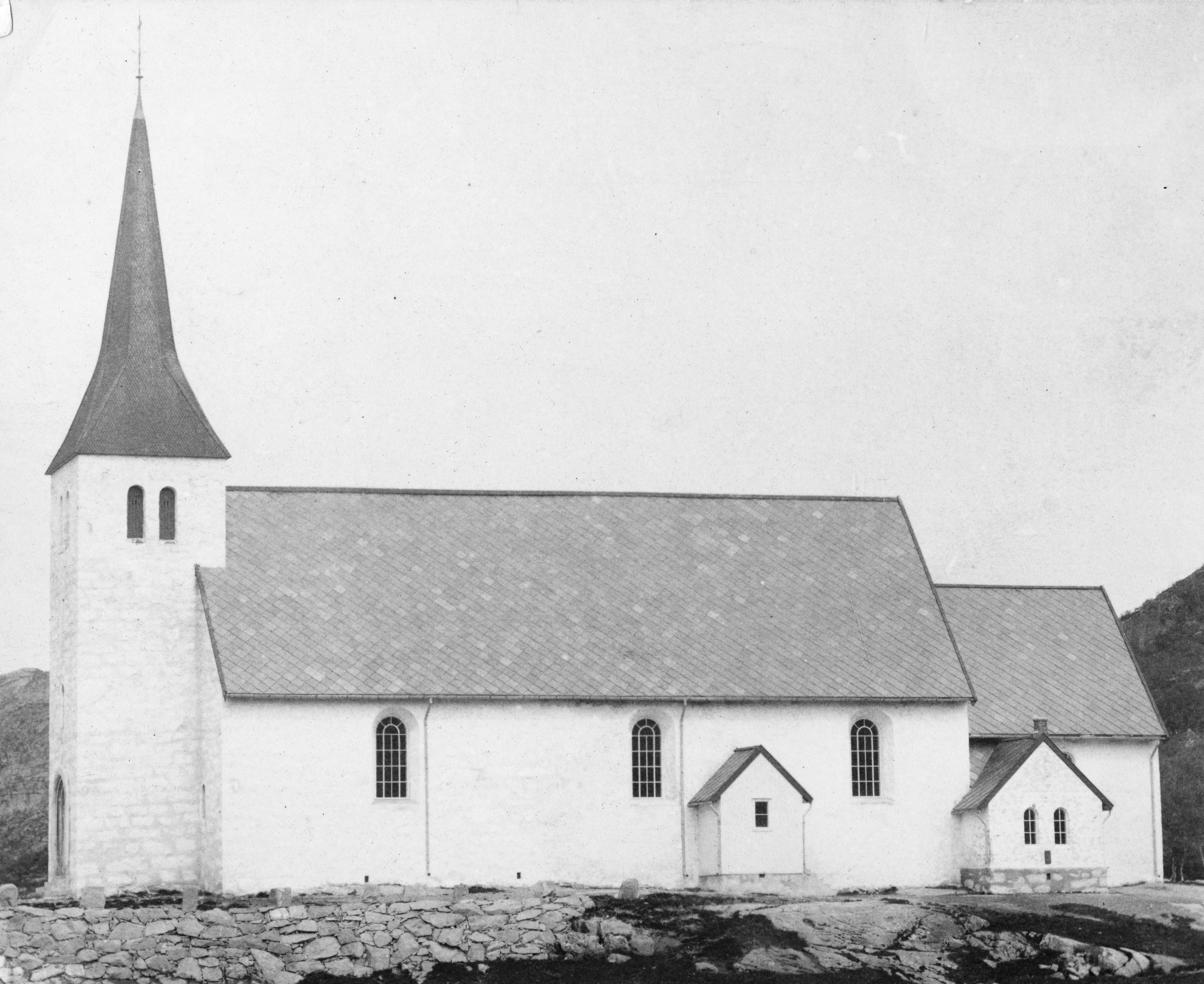 Roan kirke. Ukjent fotograf (1886). Fra NTNU UB.